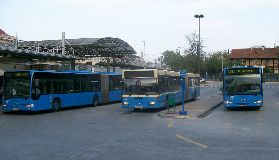 Bus Terminal in Zagreb (Croatia) - Glavni kolodvor